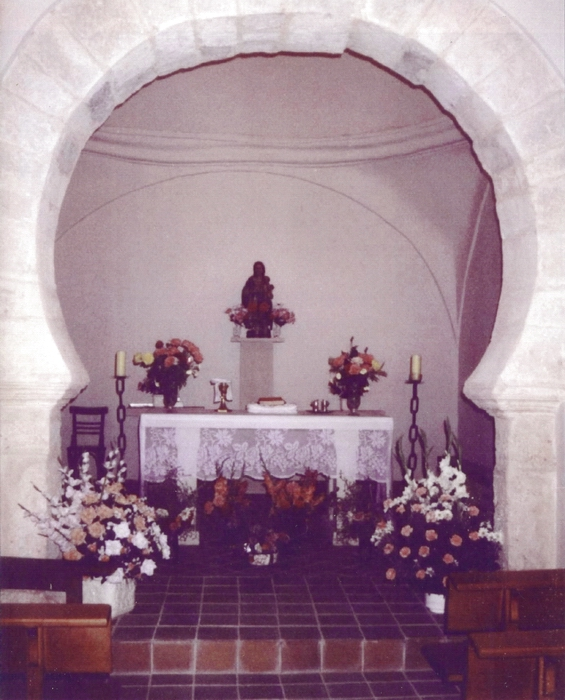 Arco mozarabe siglo X